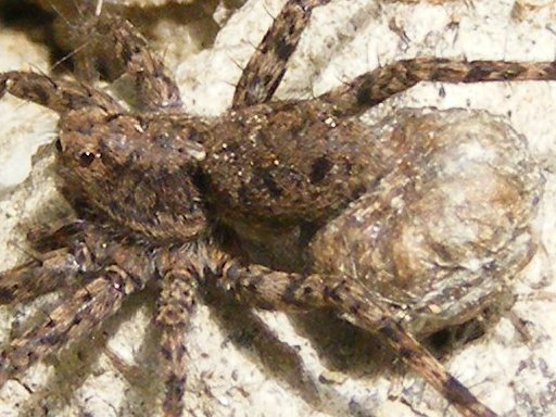 Pardosa milvina : Photographié dans la région montréalaise les 20 et 22 juin 2011, sur Fujifilm FinePix S700.